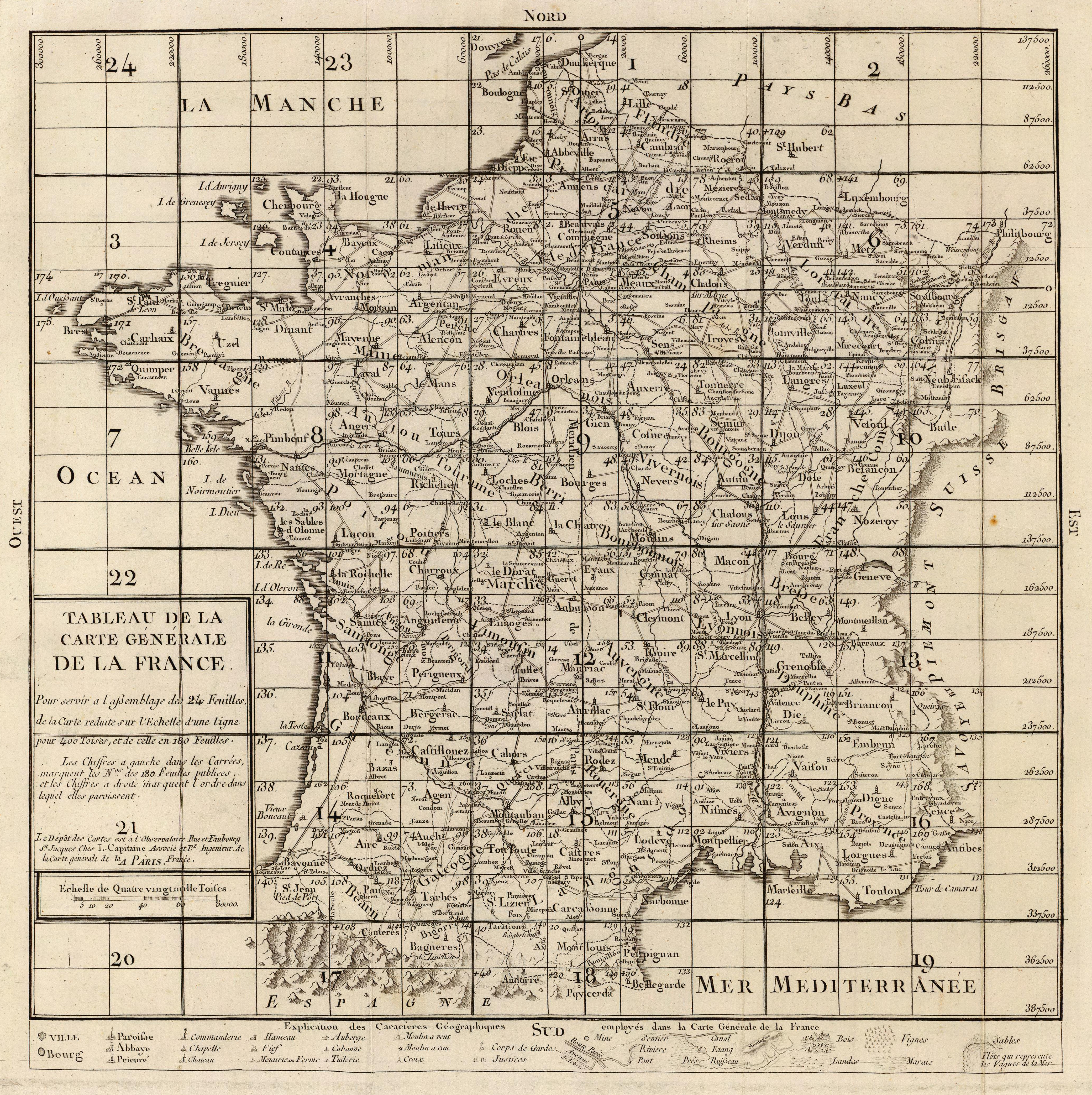 Carte de France, coordonnées rectangulaires, échelle : 1 ligne pour 400 toises